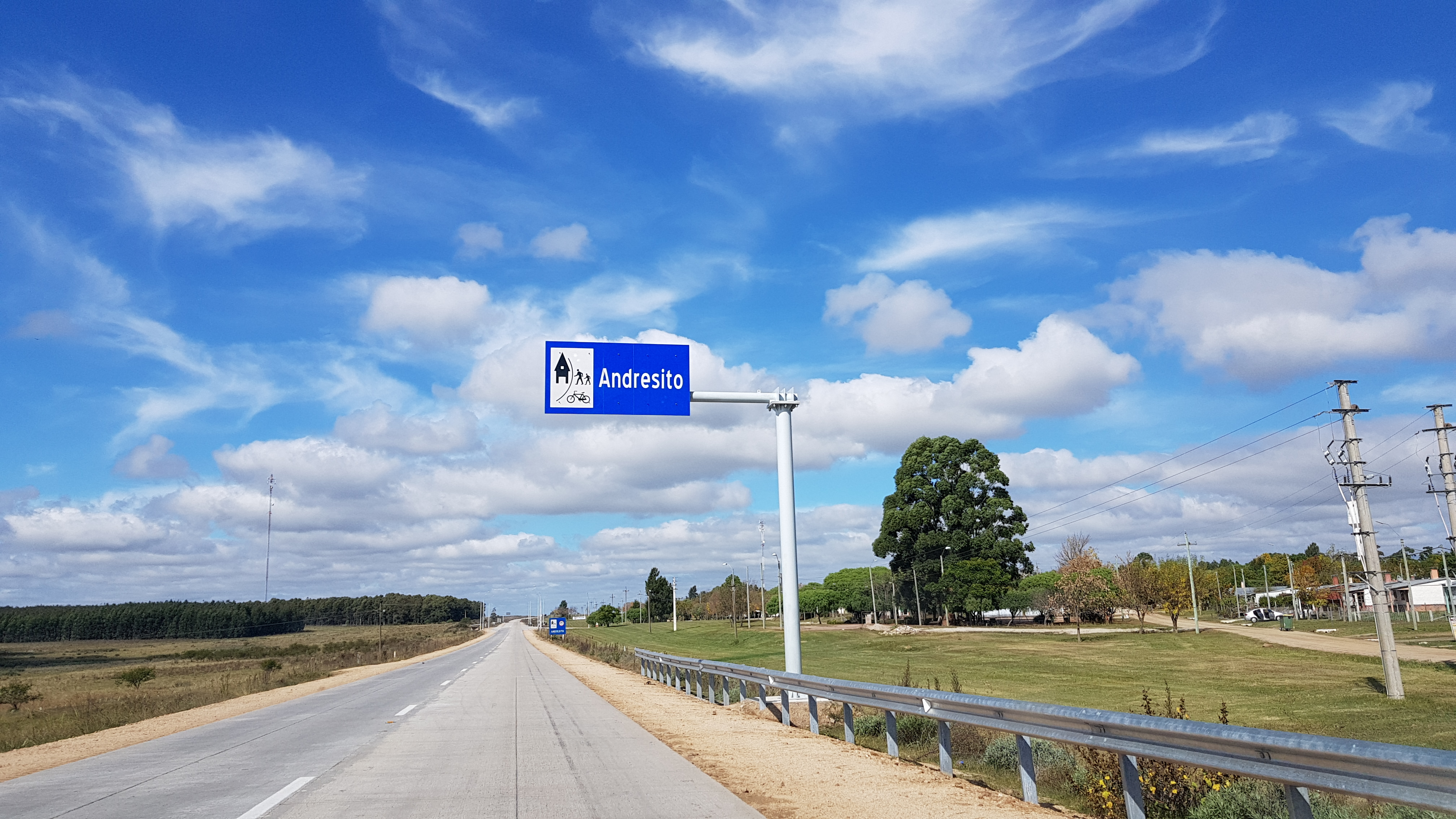 Cartel indicador de acceso a la localidad de Andresito sobre la ruta 3 en el departamento de Flores, Uruguay.